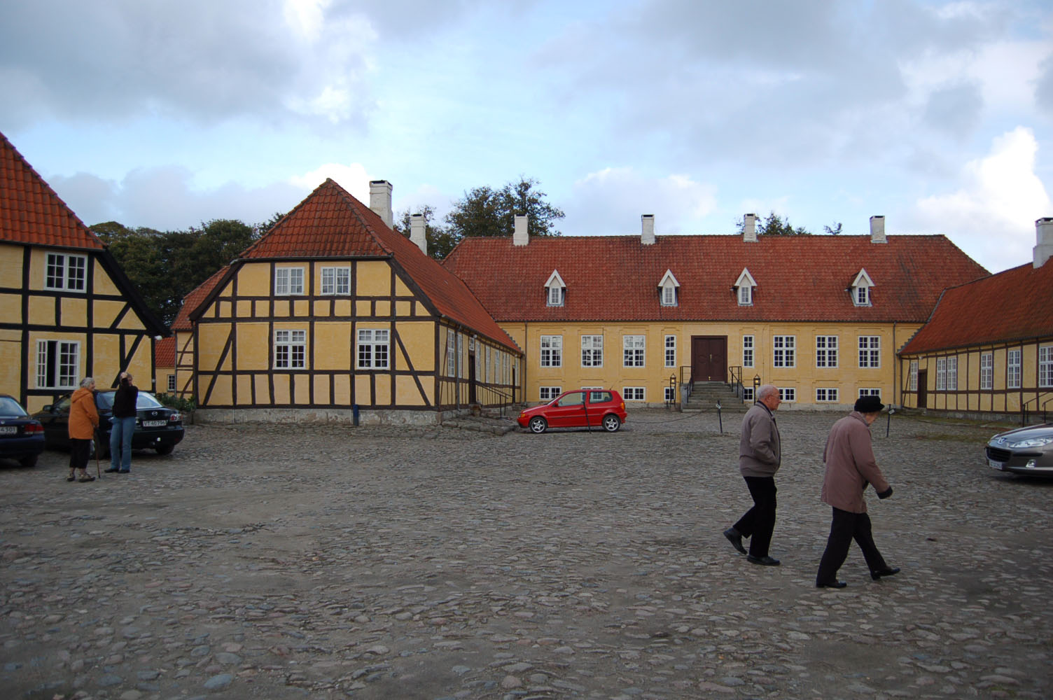 Hofmansgave - hovedbygningen